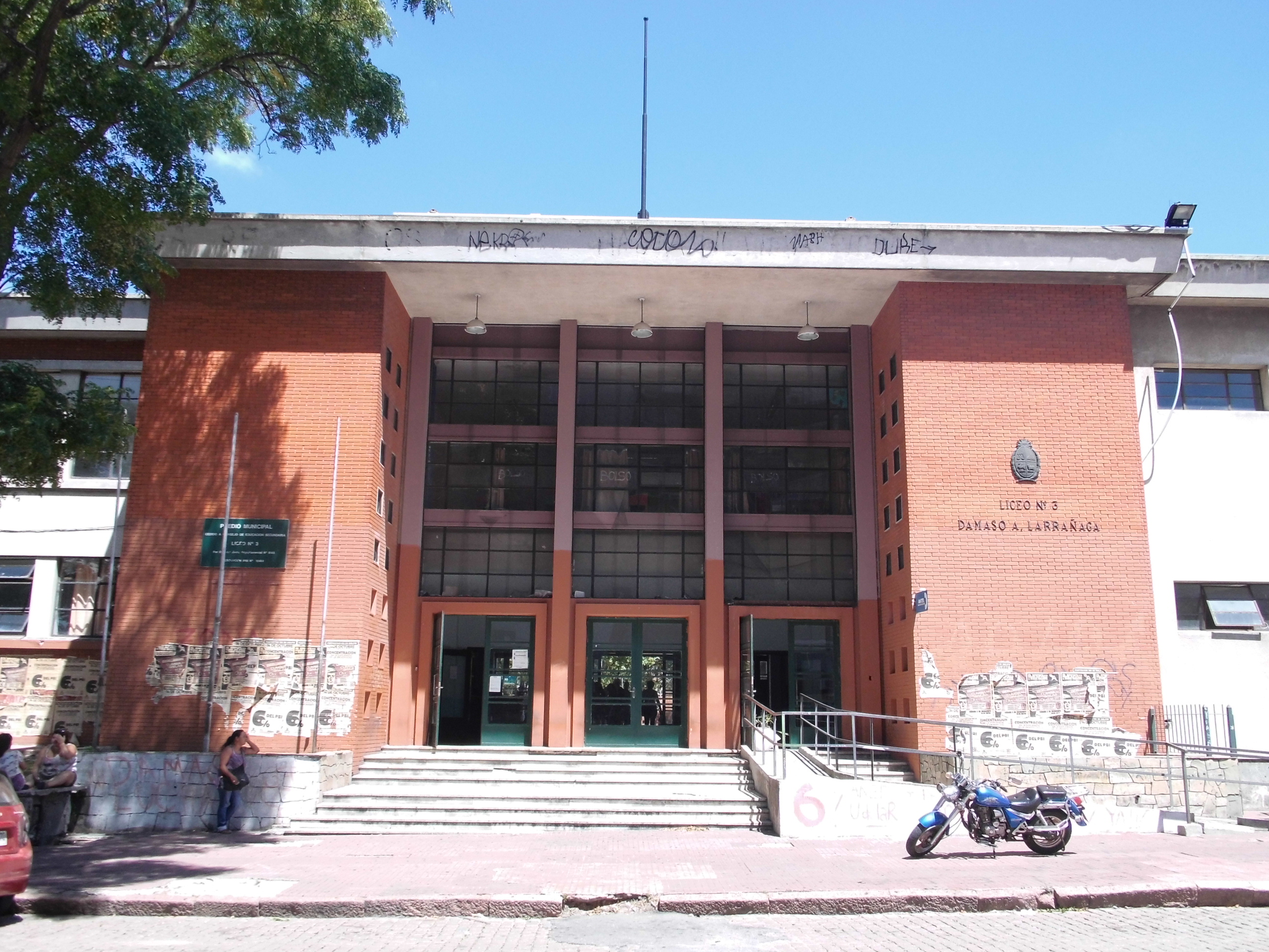 Puerta principal del Liceo Dámaso Antonio Larrañaga.